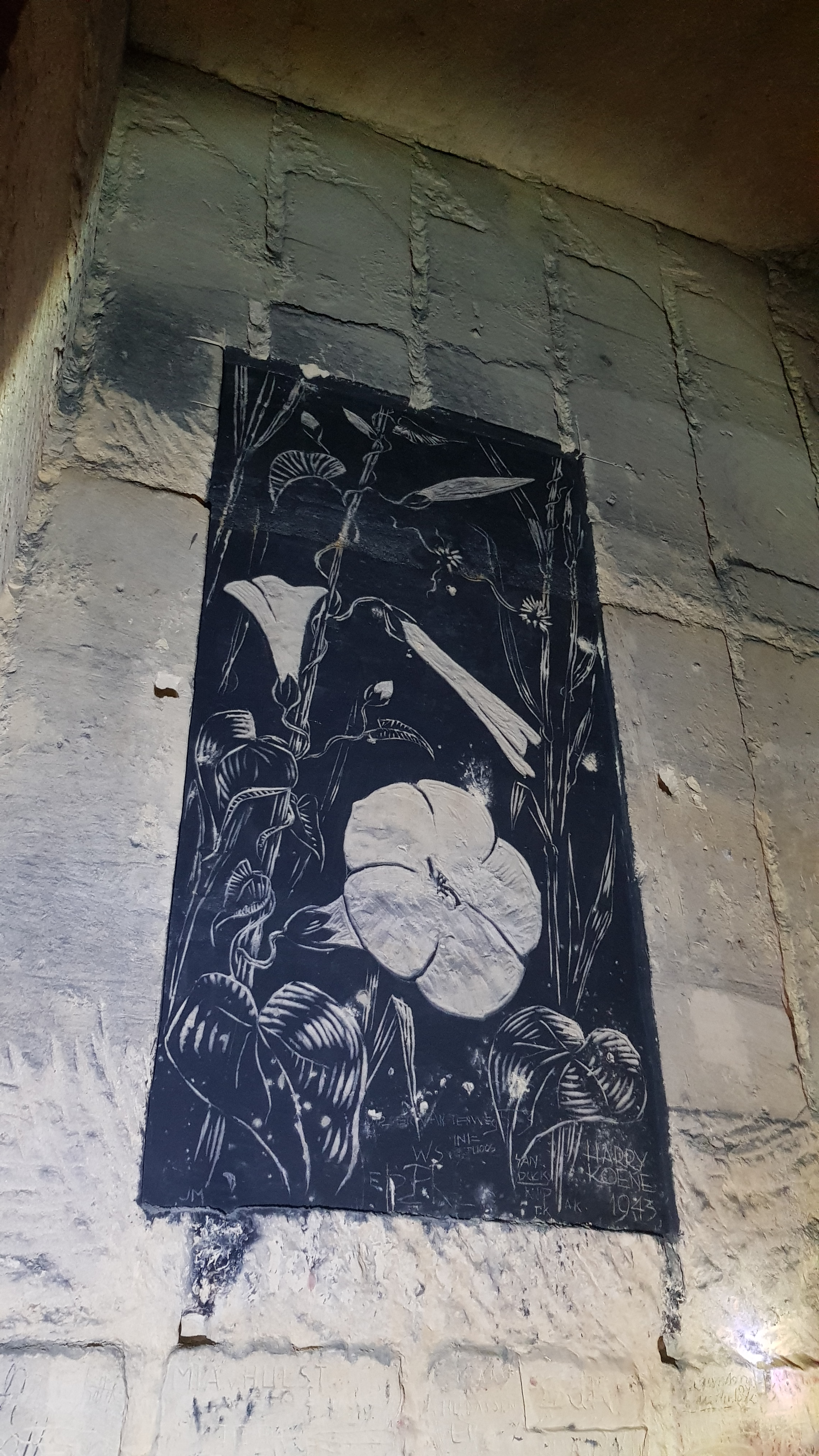 Gangenstelsel Zonneberg in de Sint-Pietersberg, Maastricht, Nederland